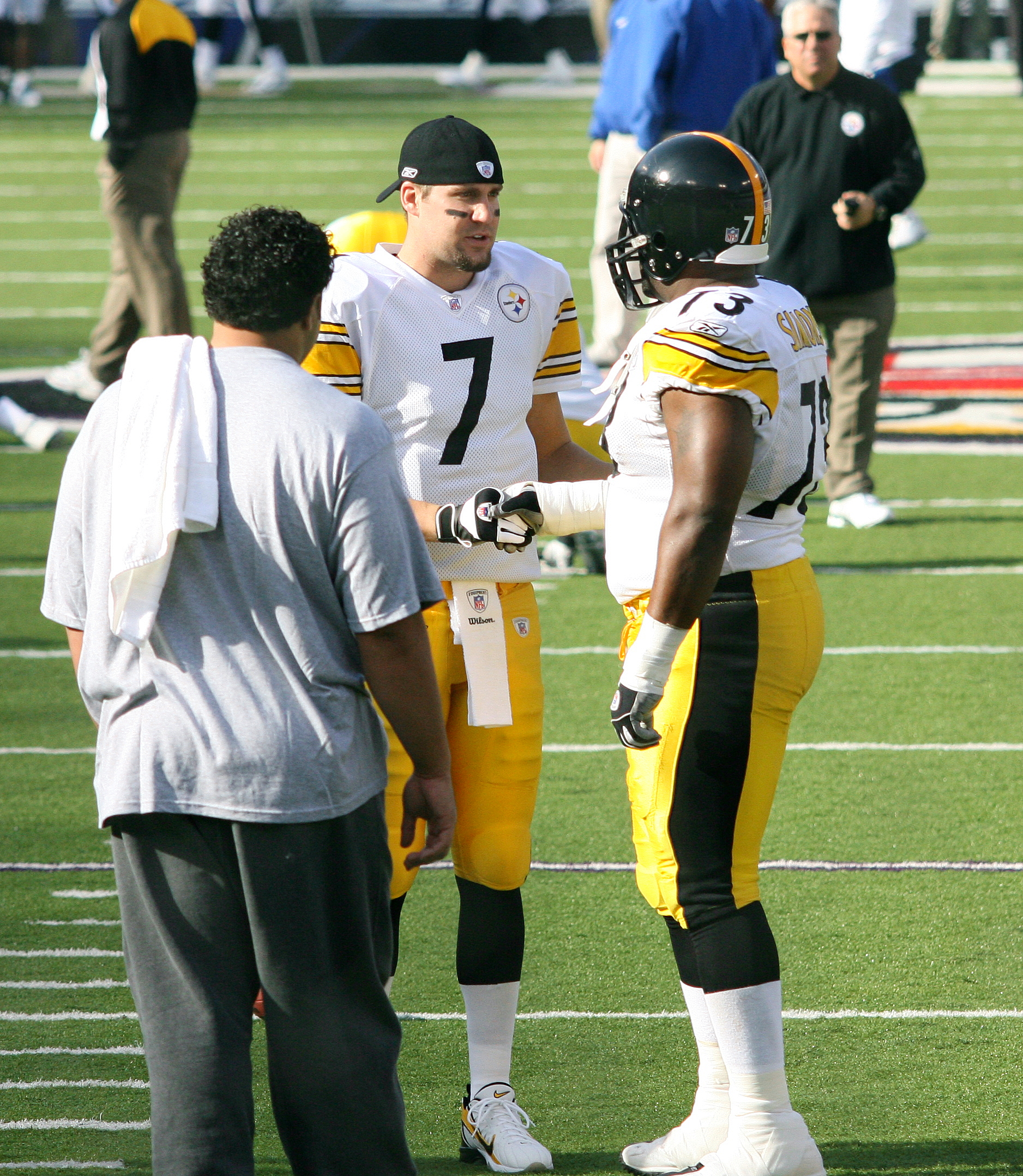 Pregame 2006-11-26